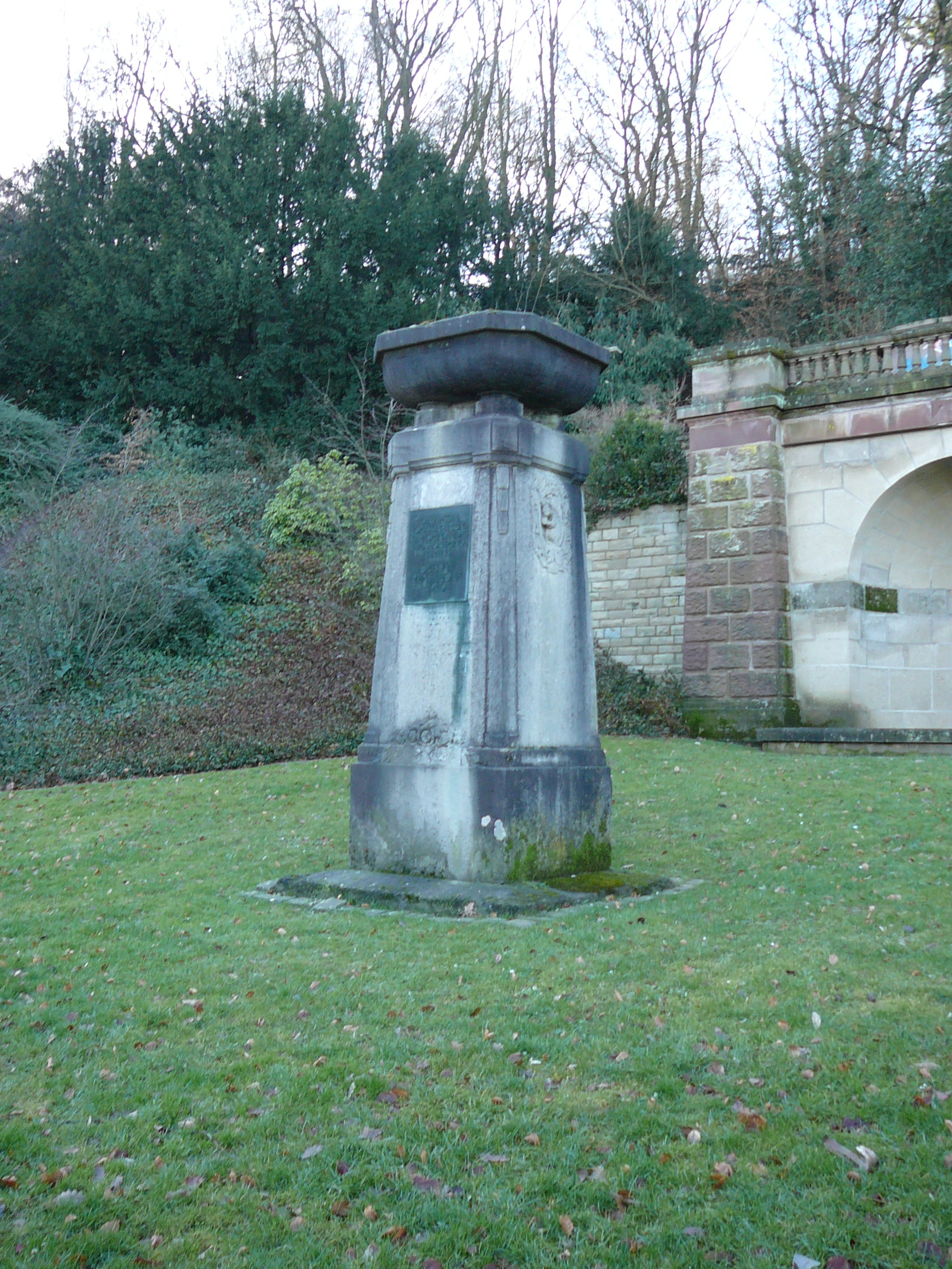 Stolleneingang im Briller Viertel, Sadowastr, Wuppertal